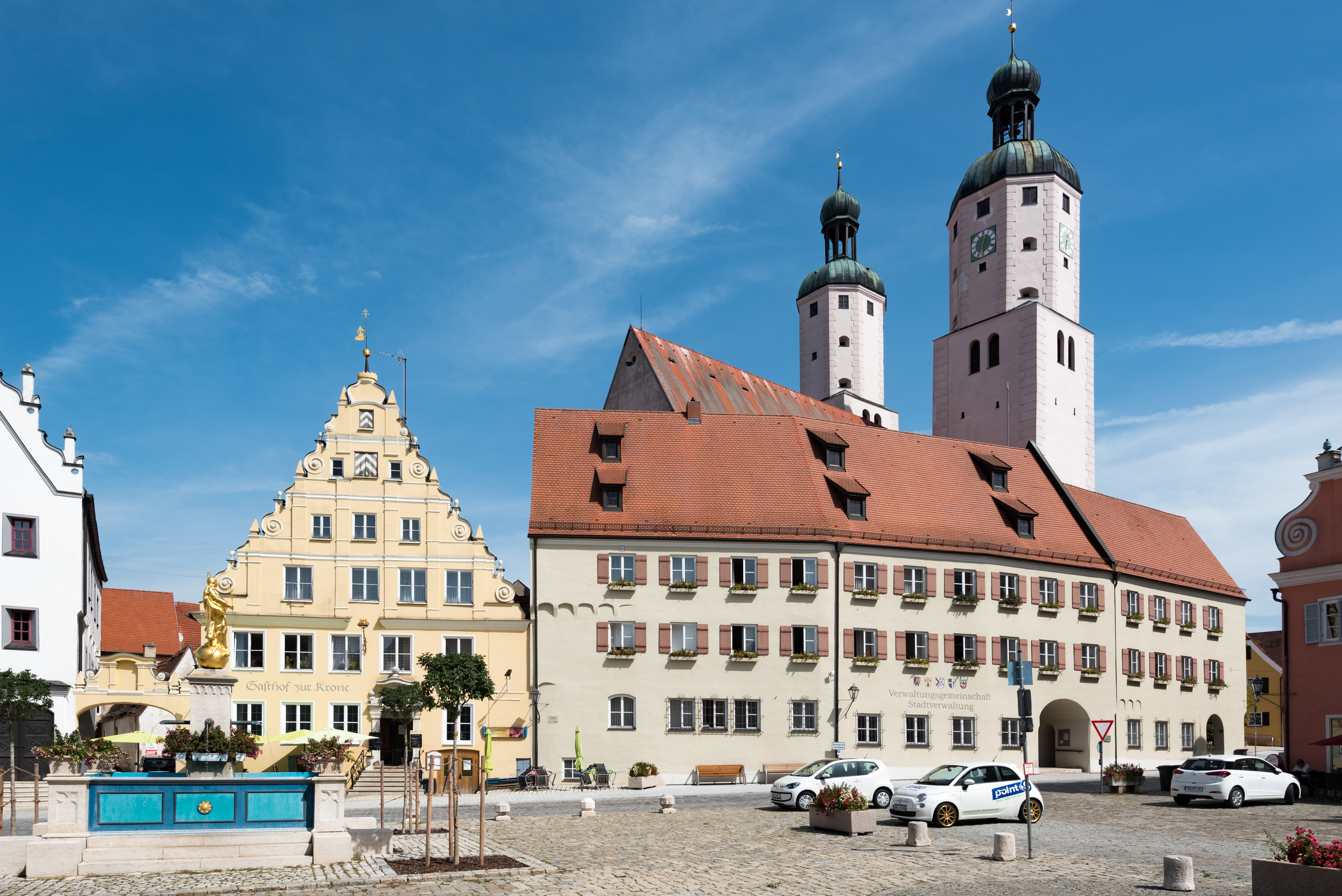 Wemding, Marktplatz, Marktbrunnen, Nr. 2, 3, St. Emmeram